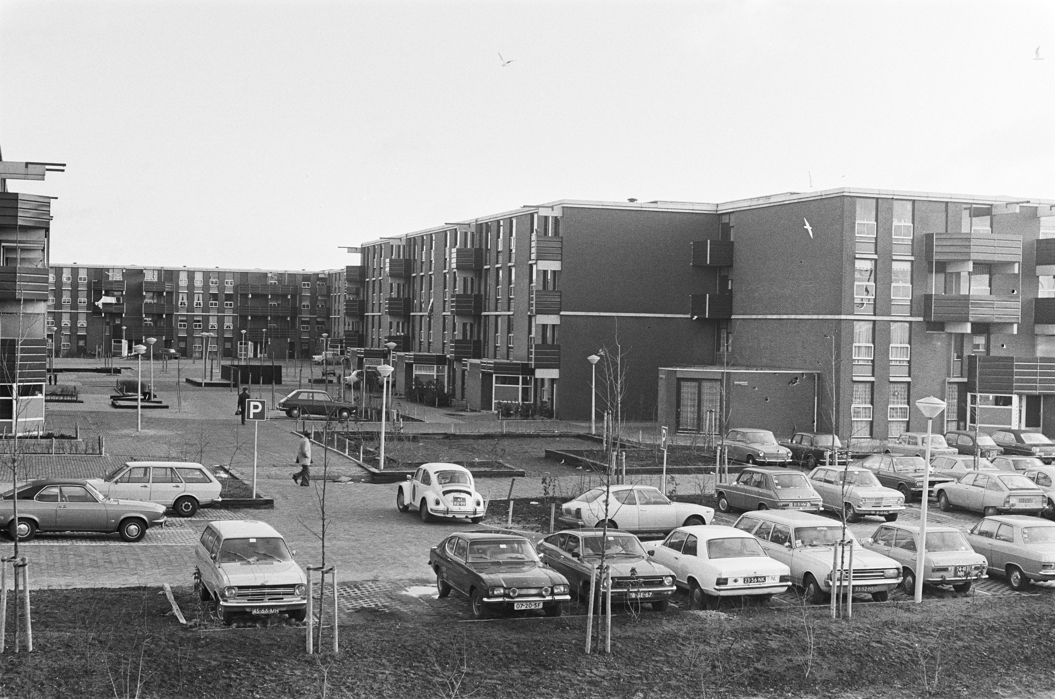 Collectie / Archief : Fotocollectie Anefo Reportage / Serie : [ onbekend ] Beschrijving : Semi-laagbouw in Holendrecht (Bijlmer) Datum : 10 januari 1978 Locatie : Amsterdam, Noord-Holland Persoonsnaam : Holendrecht Fotograaf : Verhoeff, Bert / Anefo Auteursrechthebbende : Nationaal Archief Materiaalsoort : Negatief (zwart/wit) Nummer archiefinventaris : bekijk toegang 2.24.01.05 Bestanddeelnummer : 929-5174